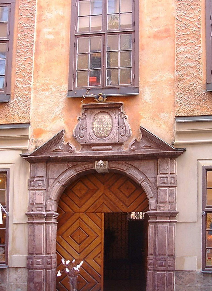 37, Österlånggatan, Gamla stan, Stockholm.